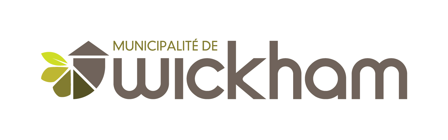 Wickham, une municipalité naturellement moderne et accueillante. Une collectivité engagée, confiante, jeune, productive et dynamique.